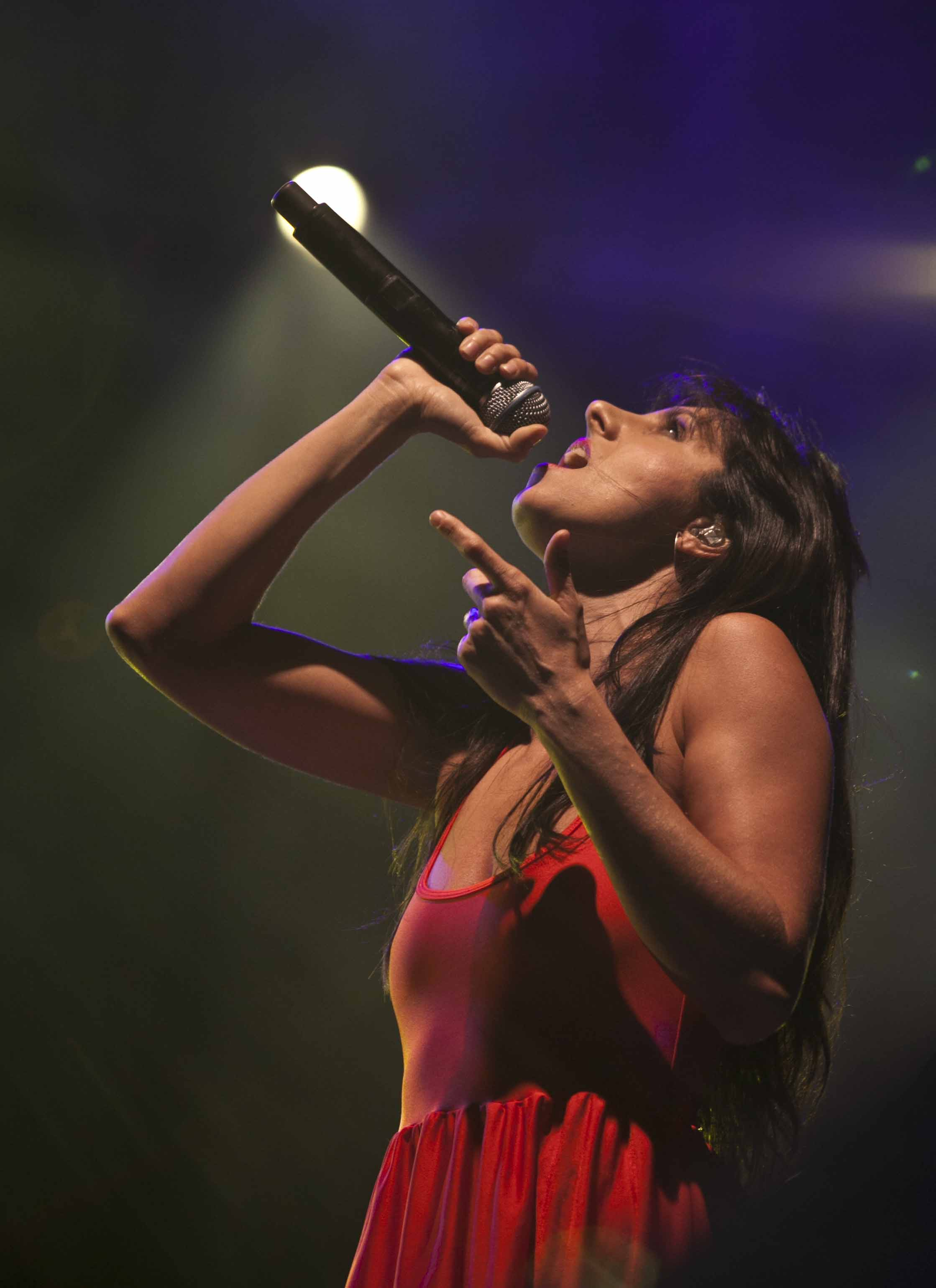 La Mala Rodríguez en la Semana Grande de San Sebastián de 2012 Argazkilaria / Fotógrafa: Sara Santos